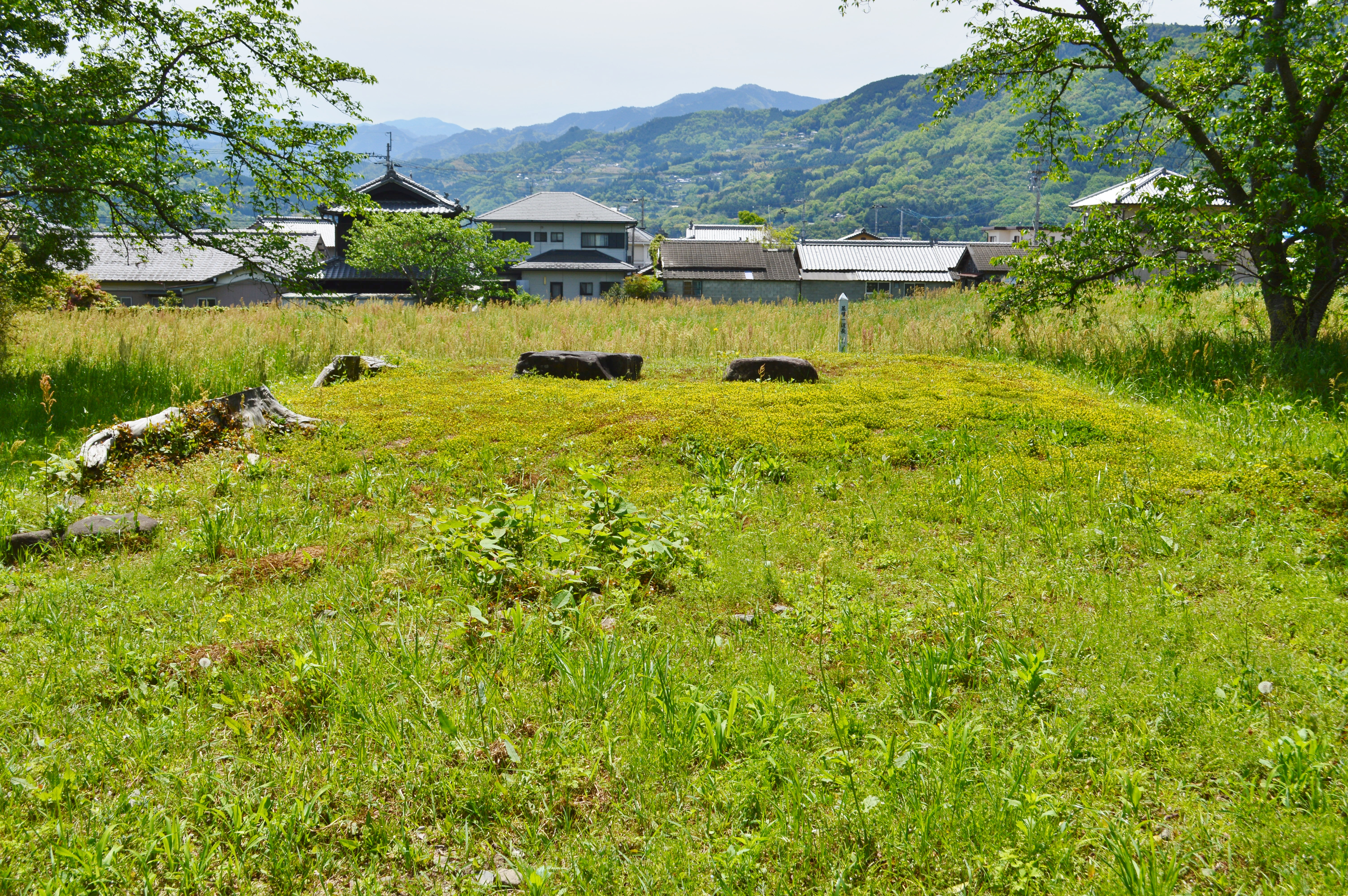 郡里廃寺跡 塔 Nikon D3200